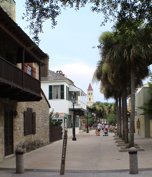 Widok na ulicę Św. Grzegorza (St. George Street). Autor zdjęcia: Meerakh